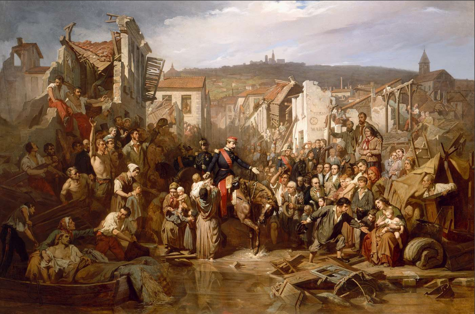 Peinture historique sur les inondations de Lyon au XIXe. L'empereur ici représenté est Napoléon III.